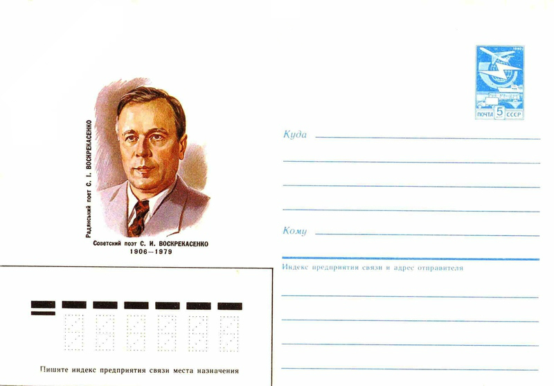 Почтовый конверт СССР с изображением украинского советского поэта-сатирика Сергея Илларионовича Воскрекасенко